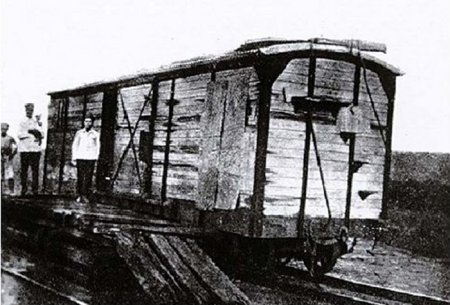 Estação provisória e original de Araçatuba Machado de Melo em madeira. O ponto de parada servia de descanso e proteção para os operários da ferrovia. A partir daí ocorreu a formação da cidade de Araçatuba.